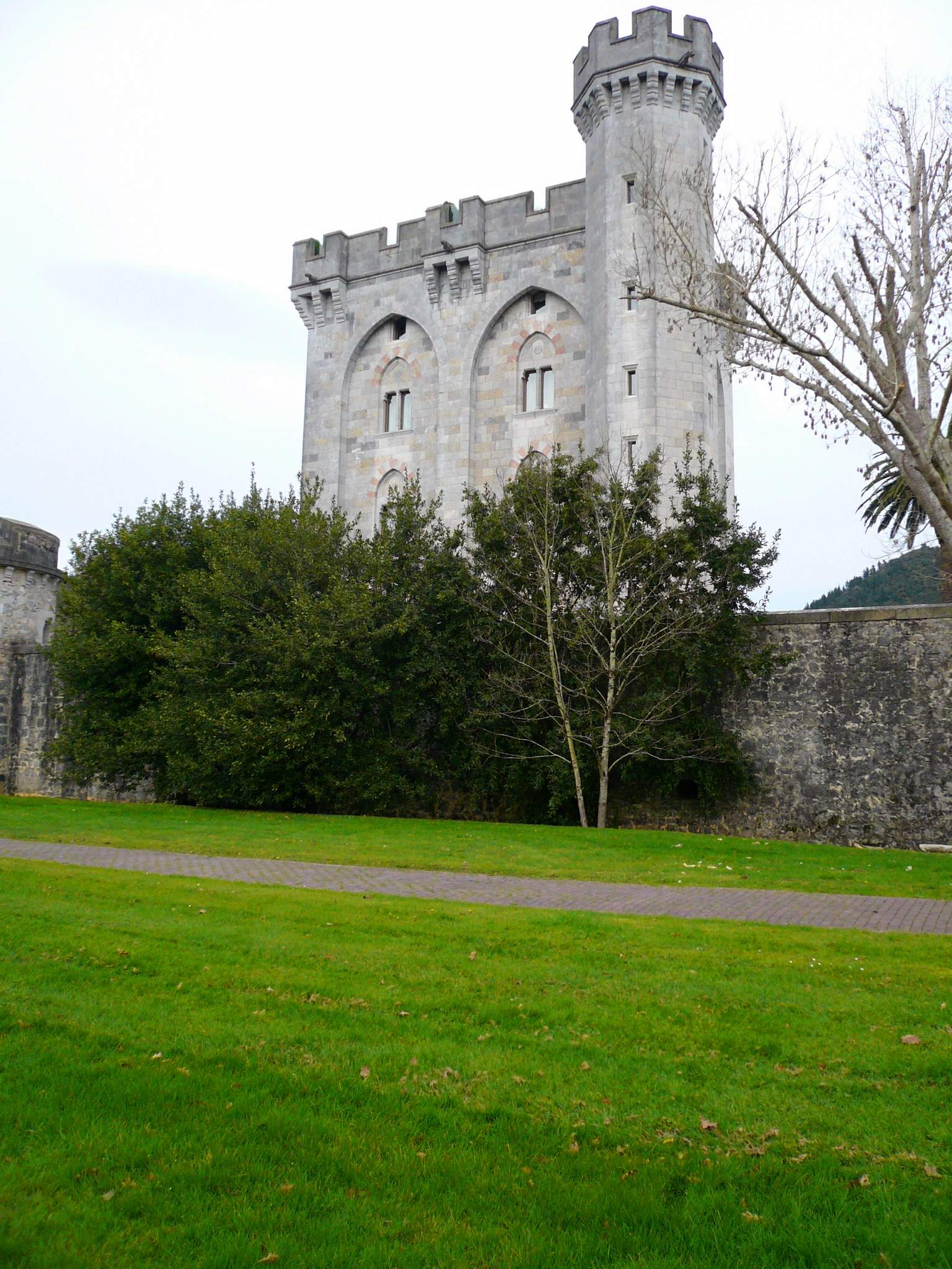 Castillo de Arteaga (Gautegiz Arteaga, Vizcaya)